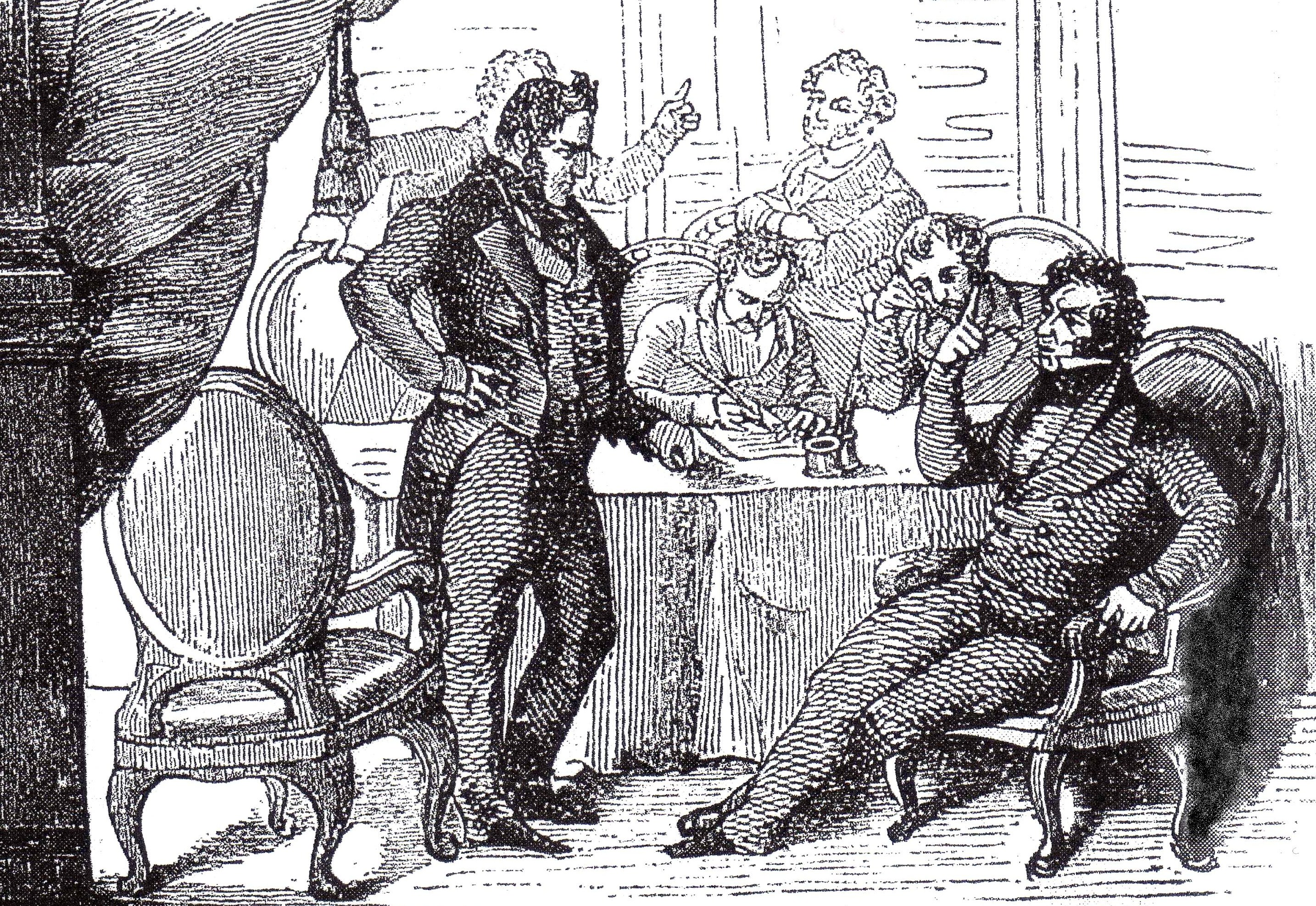 Grabado que refleja la forma de hacer política de los ministros durante la regencia de María Cristina